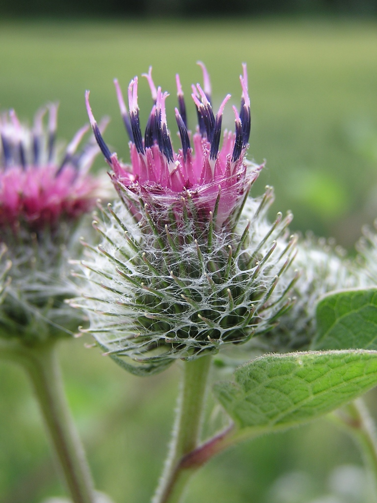 Arctium tomentosum in der Nähe von Bonn.